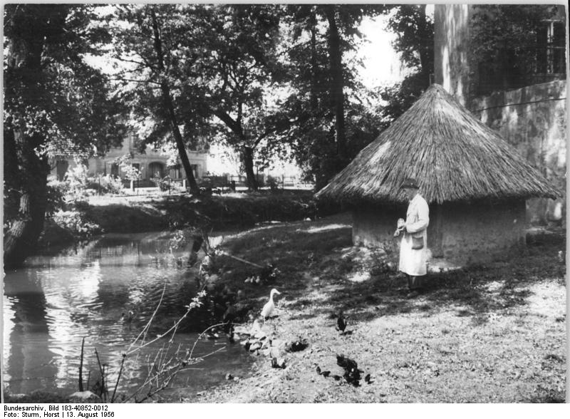 Hoyerswerda, Tierpark Zentralbild Sturm Quasch 13.8.1956 - Breiteste Heranziehung der Bevölkerung zur Mitarbeit im Staatsapparat - das ist das Ziel von Hoyerswerda siehe Begleittext 1 - 12 N - UBz: Die Handwerker von Hoyerswerda errichteten in freiwilliger Arbeit einen kleinen Tierpark am Schloß.